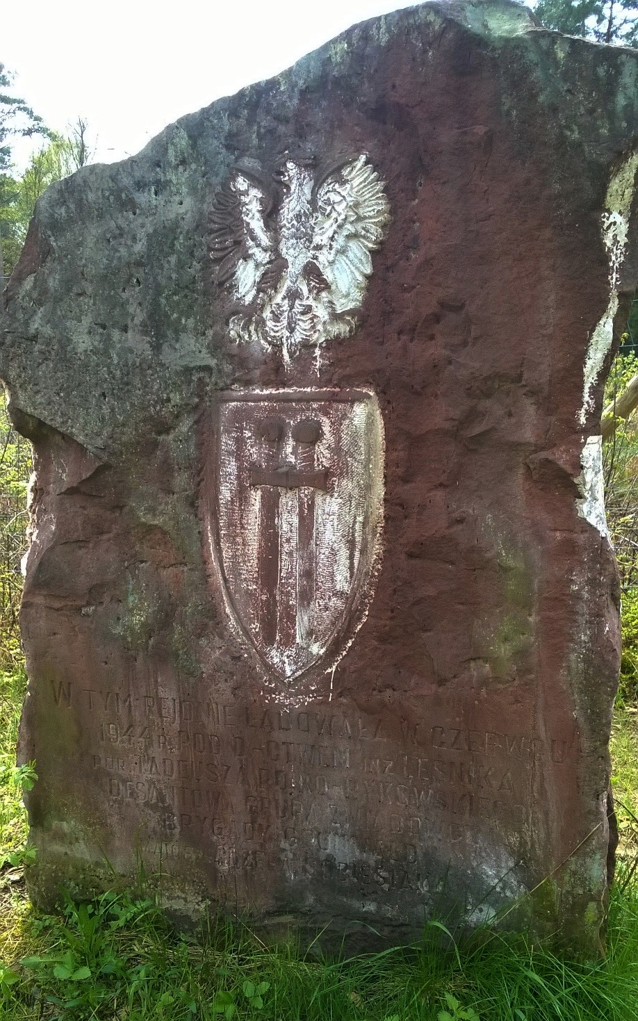 Kamień upamiętniający desant grupy zwiadowczej Brygady Grunwald w 1944 r.